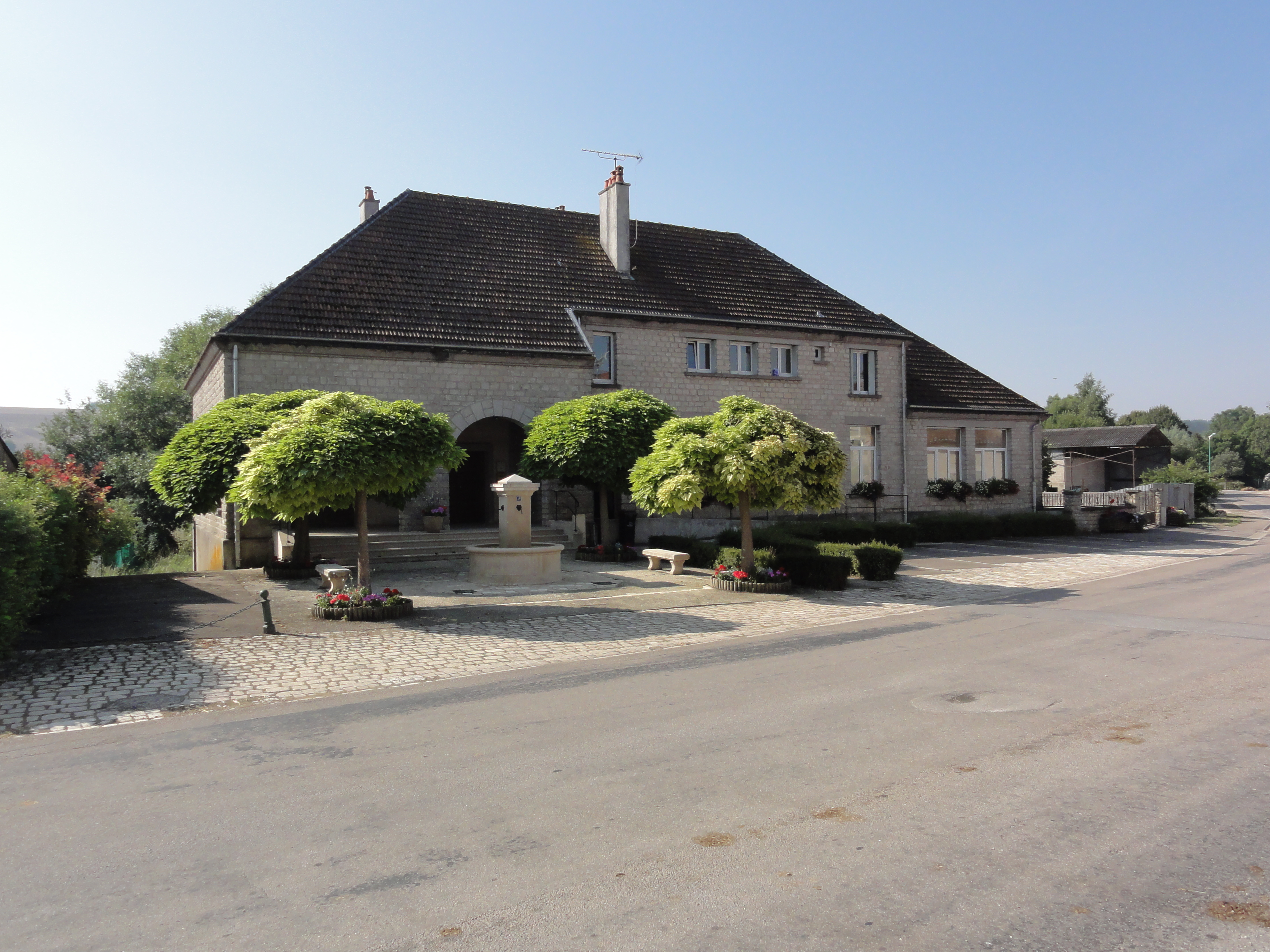 Récourt-le-Creux (Meuse) mairie-école